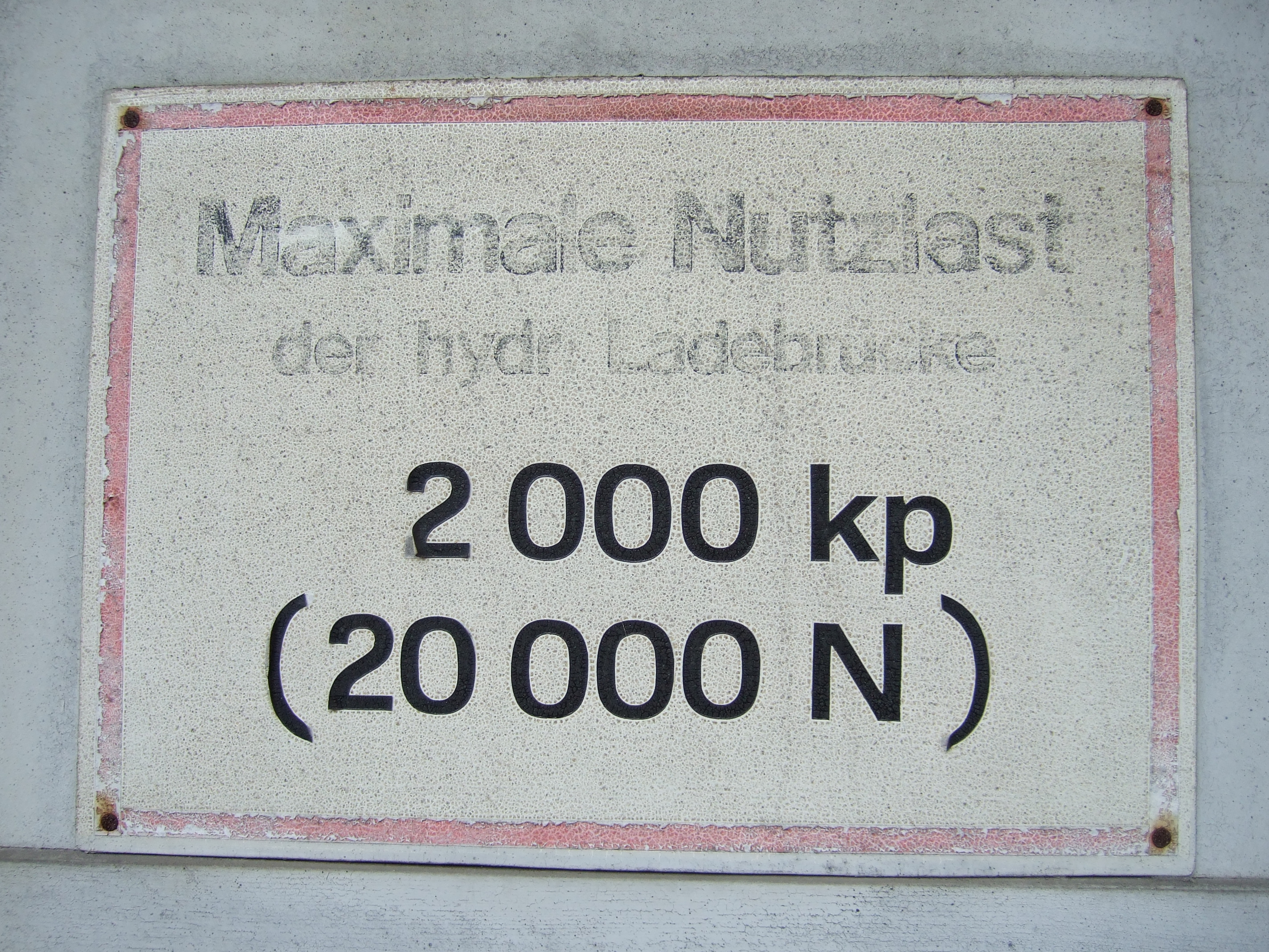 Warnschild an einem leerstehenden Fabrikgebäude in der Gubener Straße 9, Frankfurt (Oder), Deutschland, mit der Angabe der maximalen Nutzlast für eine hydraulische Ladebrücke in Kilopond und Newton. Das Schild stammt aus der Ära der DDR. Inschrift: Maximale Nutzlast / der hydr. Ladebrücke / 2 000 kp / (20 000 N)